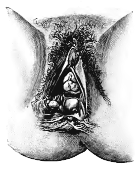 Fig. 207. Unvollständiger Dammriß, die gelockerte vordere und hintere Scheidenwand erkennen lassend.